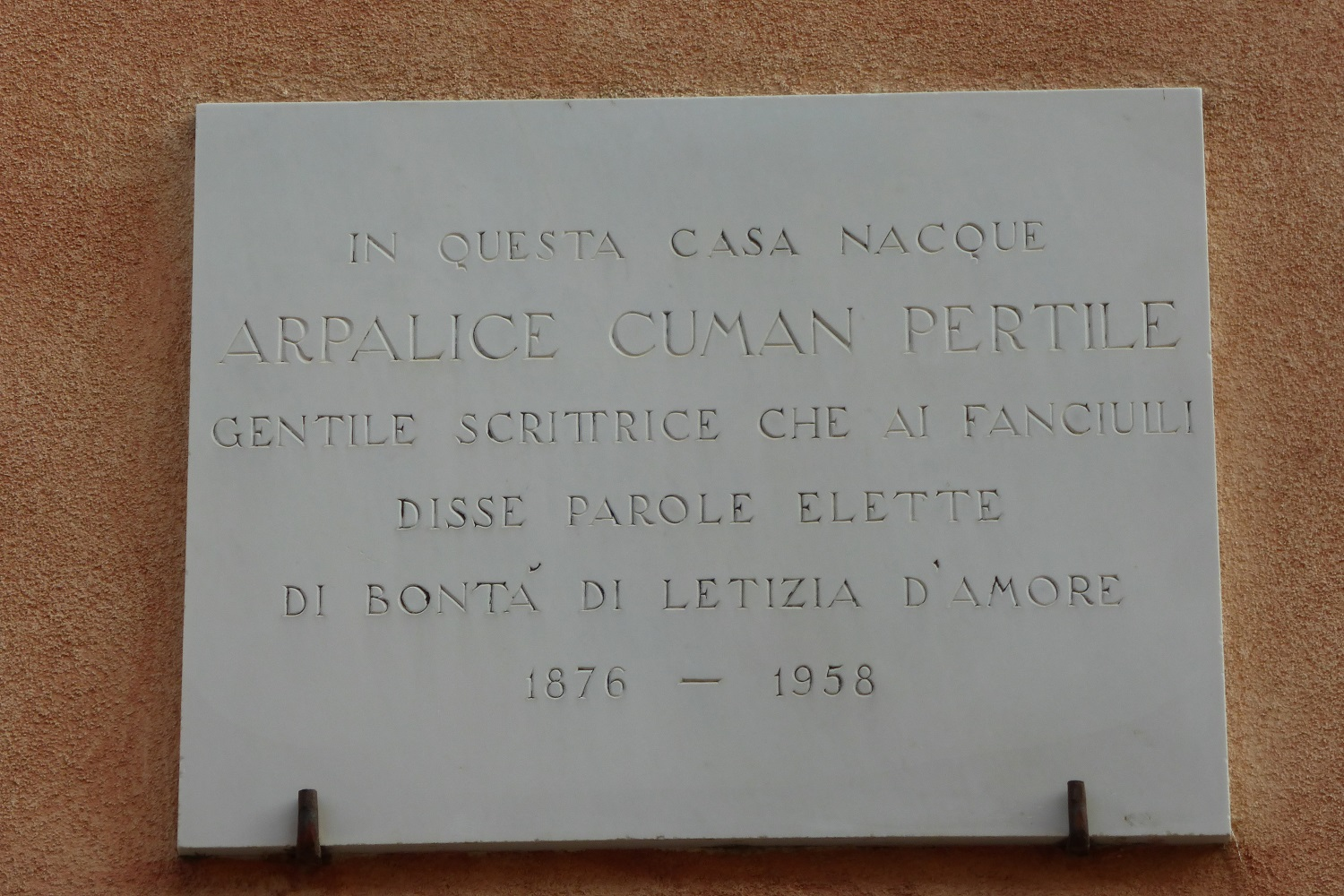 Marostica (PD) Targa abitazione Arpalice Cuman Pertile in Corso Mazzini, 31